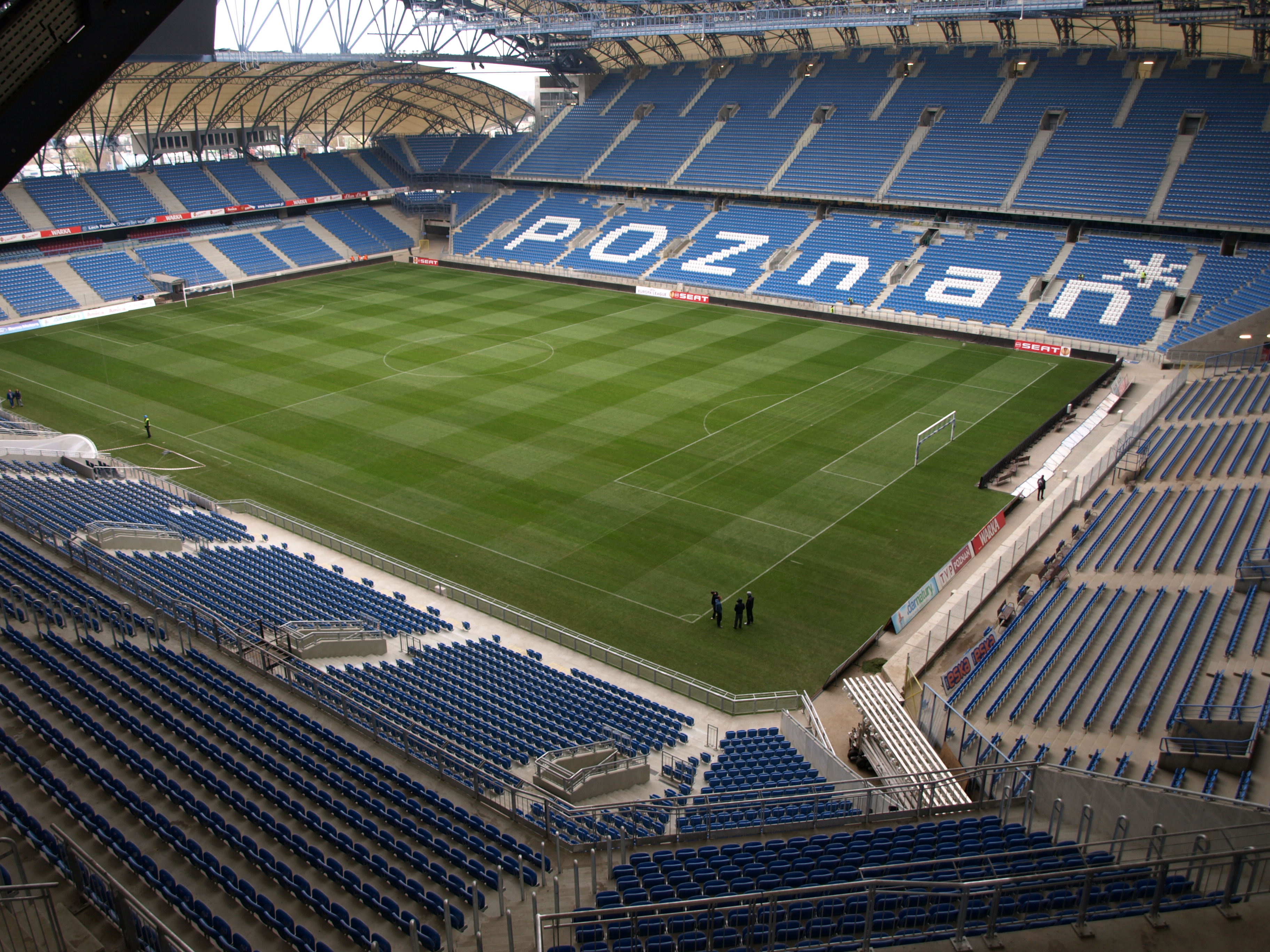 Stadion Lecha Poznan